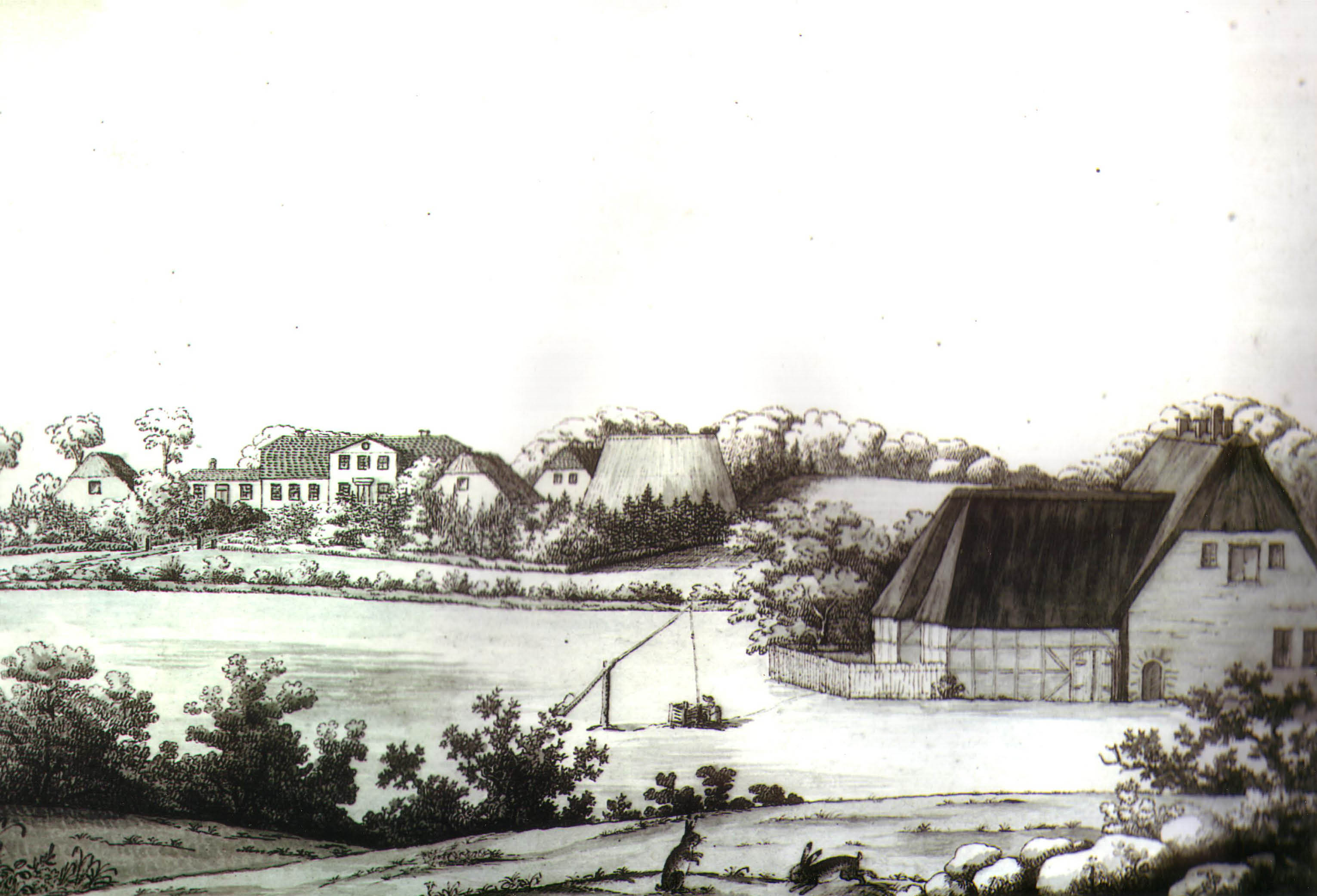 Gut Falkenberg, Gemeinde Lürschau, Kreis Schleswig, Germany